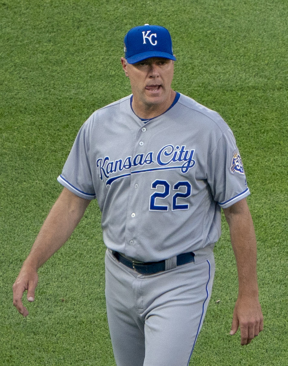 Royals at Orioles 5/8/18